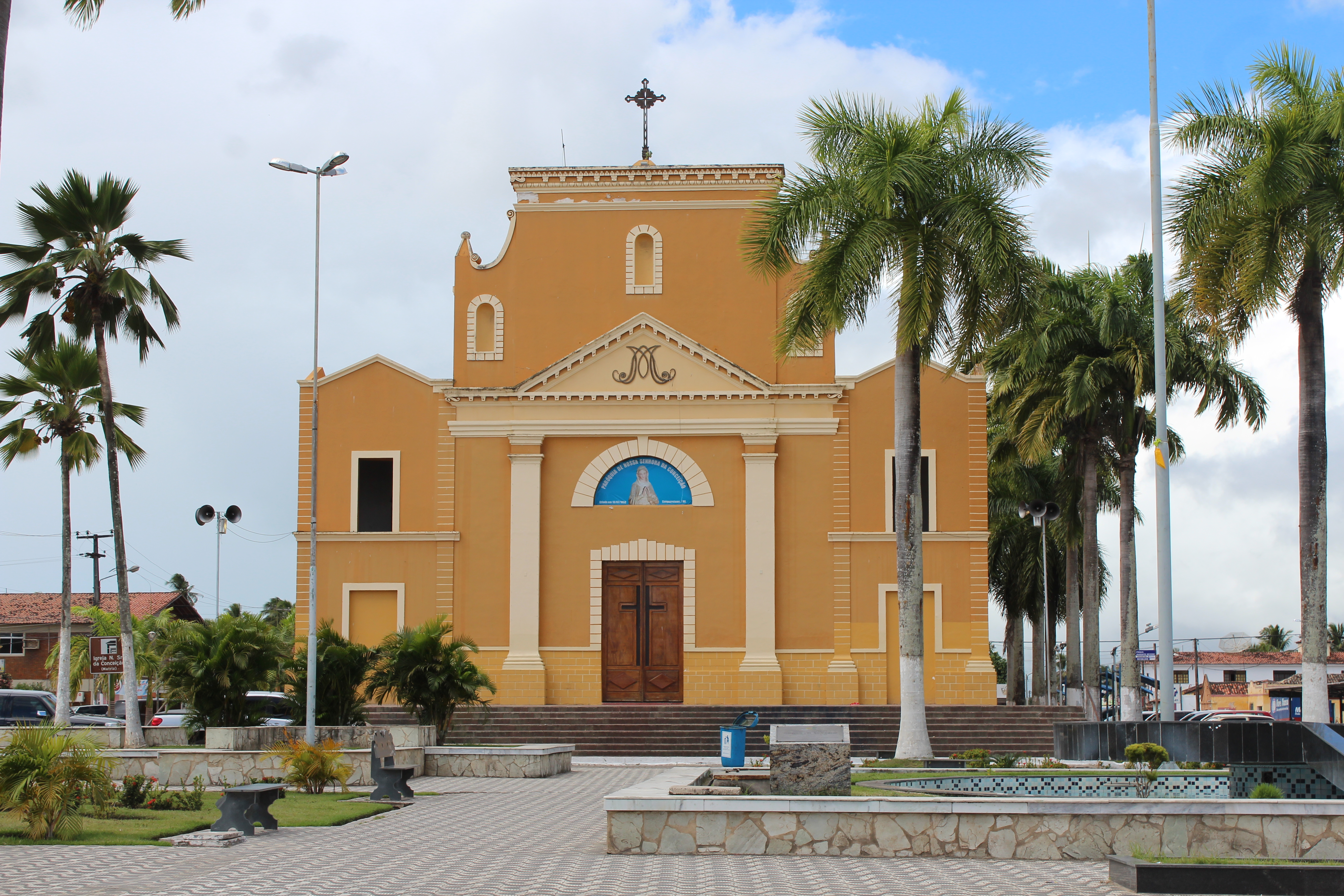 Igreja Matriz de Canguaretama, Canguaretama, Rio Grande do Norte, Brazil